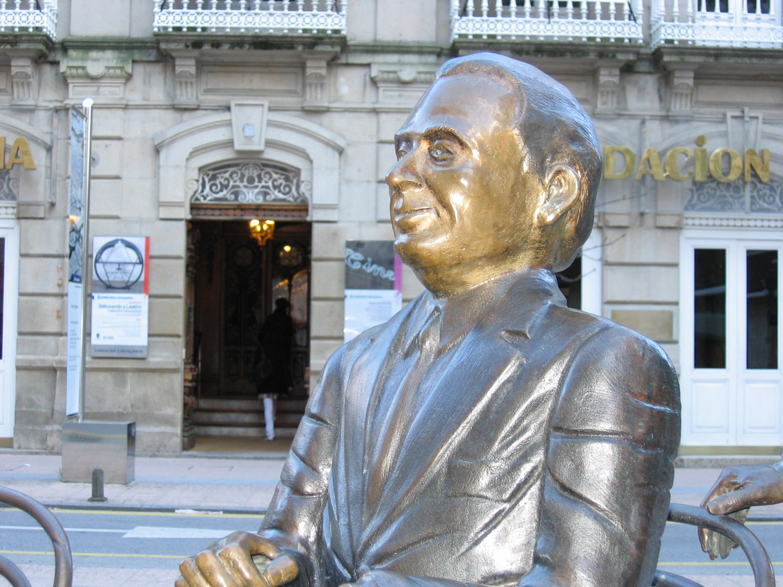 Valentín Paz-Andrade (conxunto escultórico na praza de San Xosé, Pontevedra; obra de César Lombera, 2006).